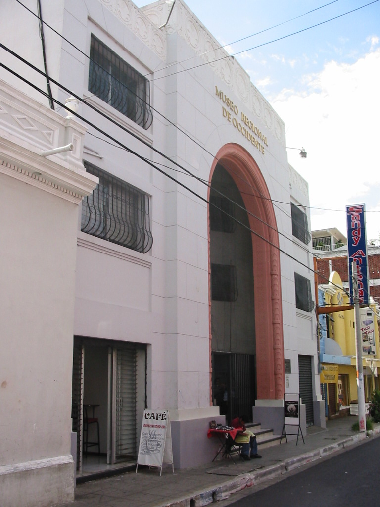 Metrocentro Santa Ana / Museo Regional de Occidente ubicado en la ciudad salvadoreña de Santa Ana.